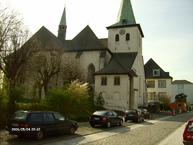 Propsteikirche Arnsberg